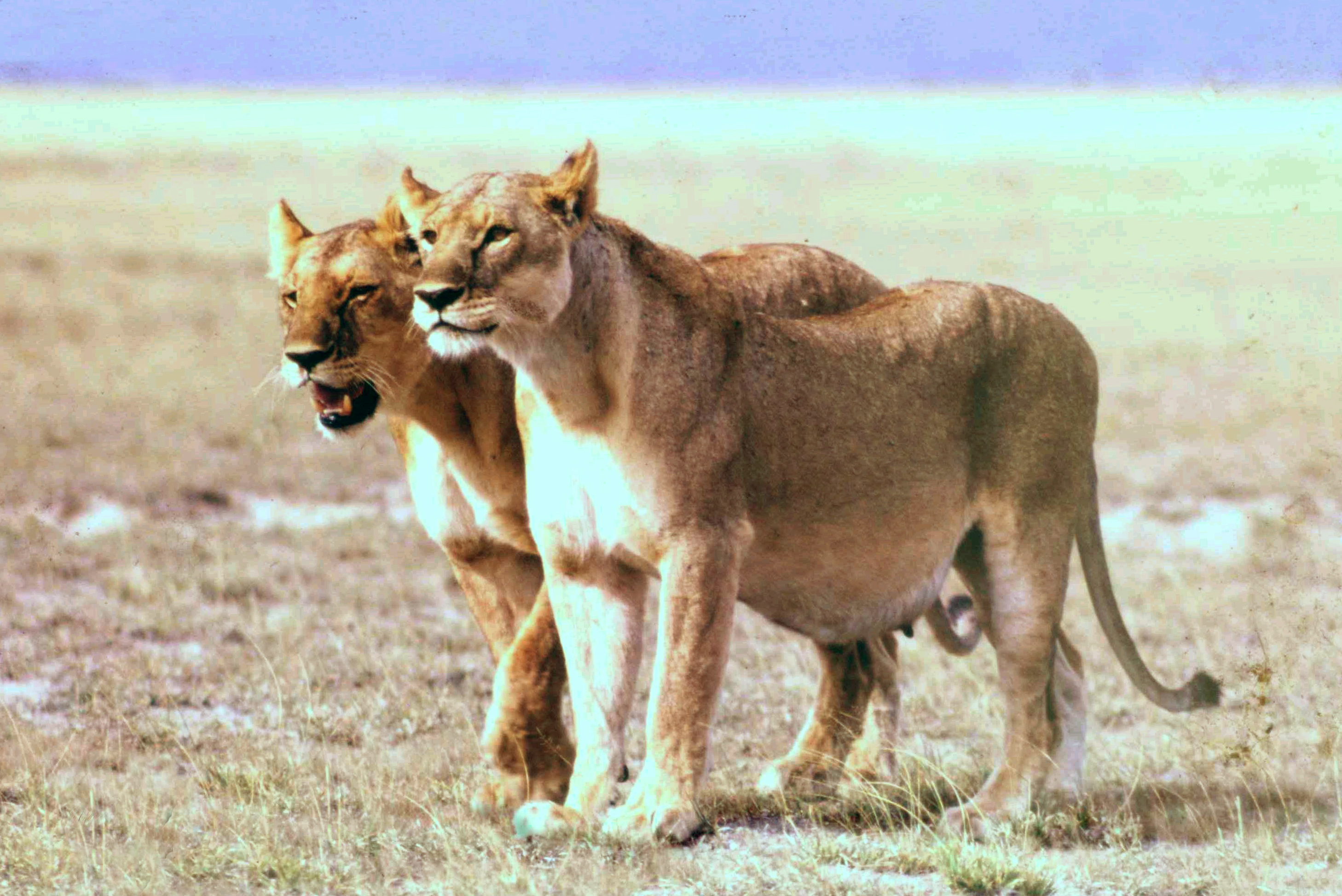 Pregnant lioness.